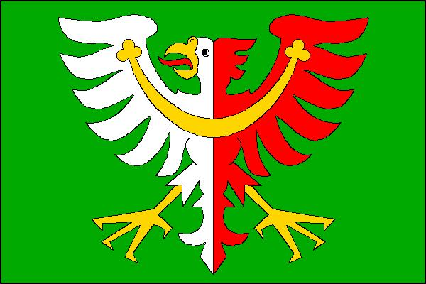 Vlajka obce Olbramovice